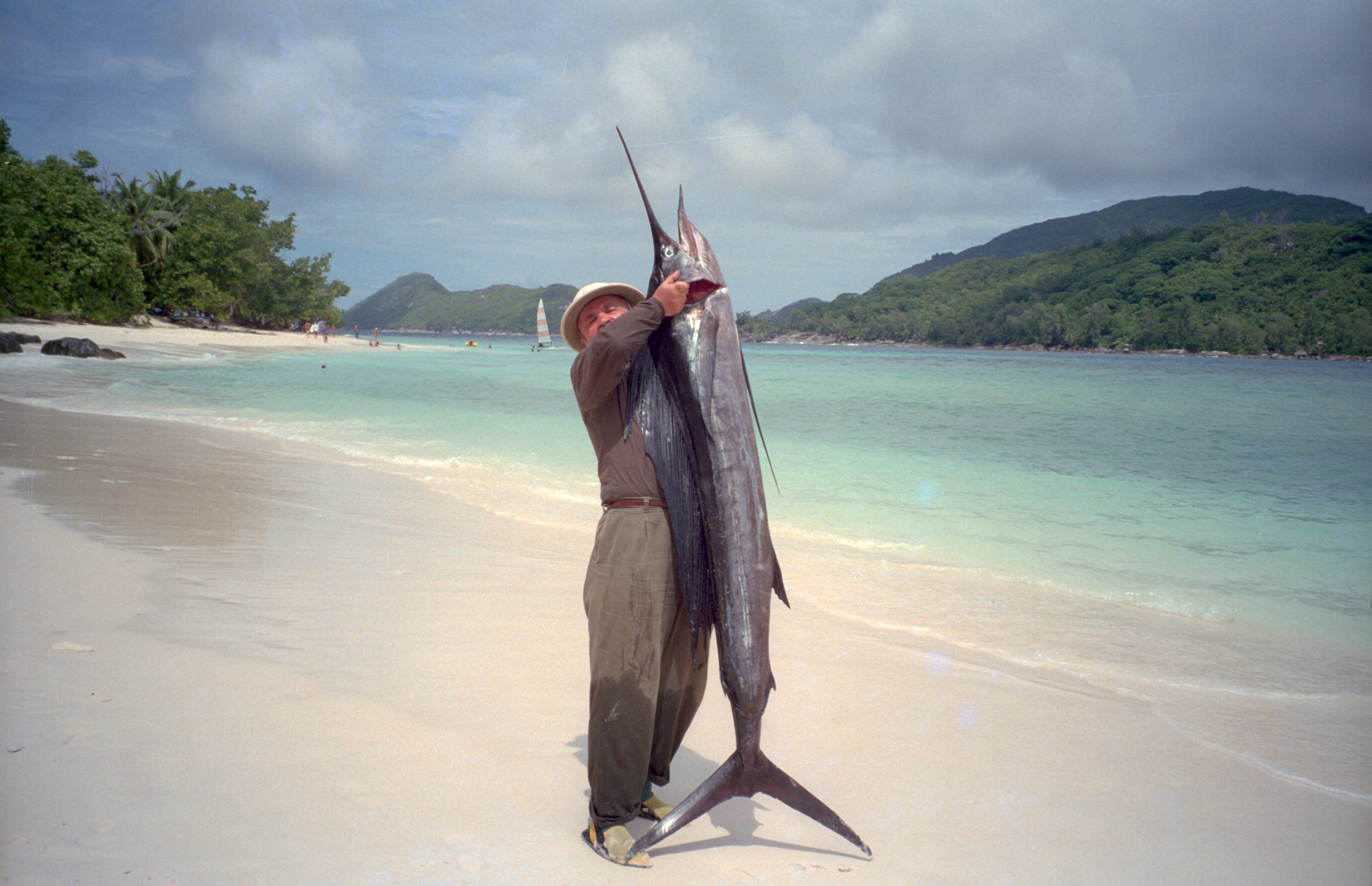 Mahe Beach, Seychelles